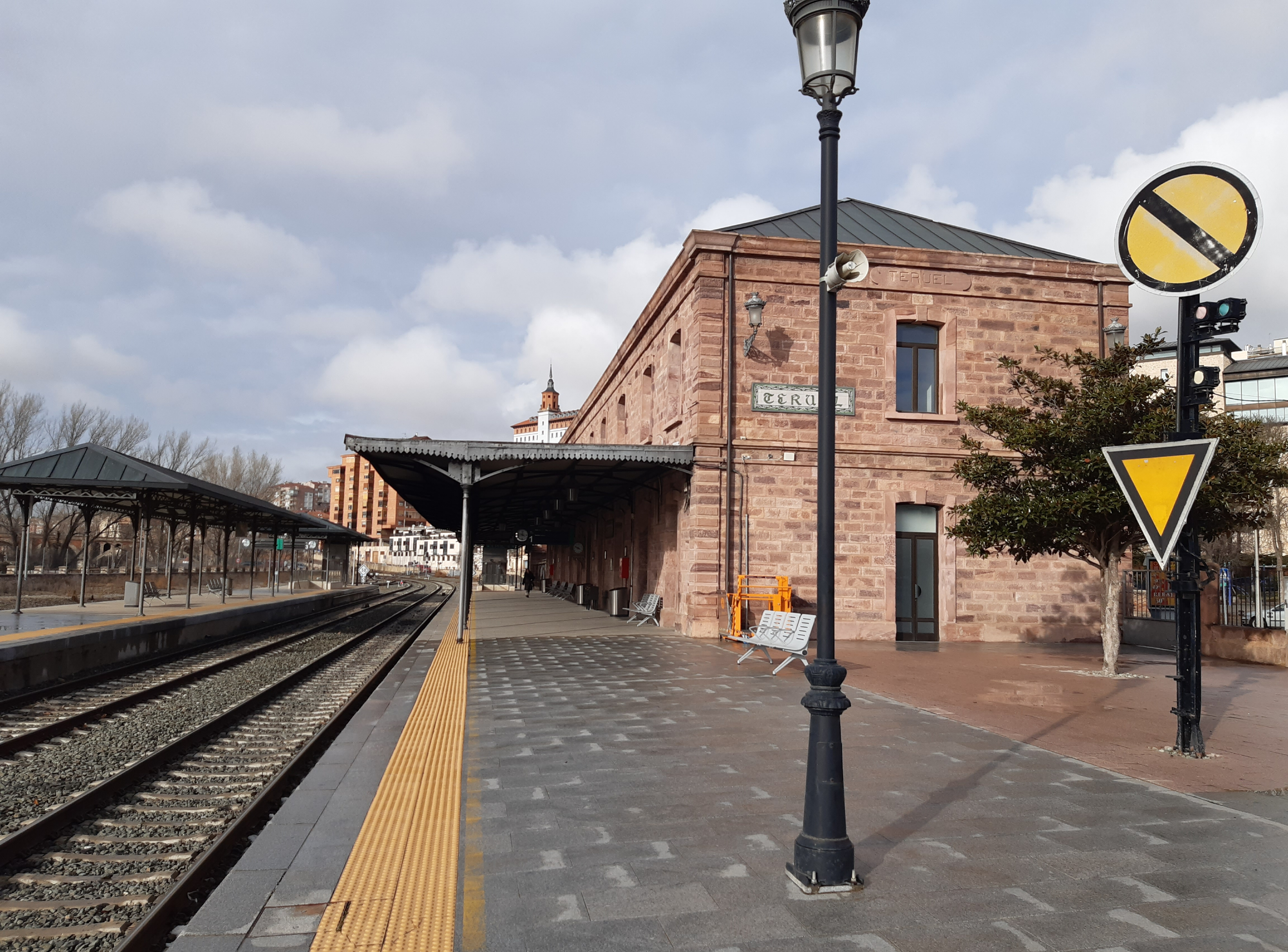 Estacion de Teruel vista desde el andén de salidas de trenes regionales a Valencia. 25 de enero de 2020.